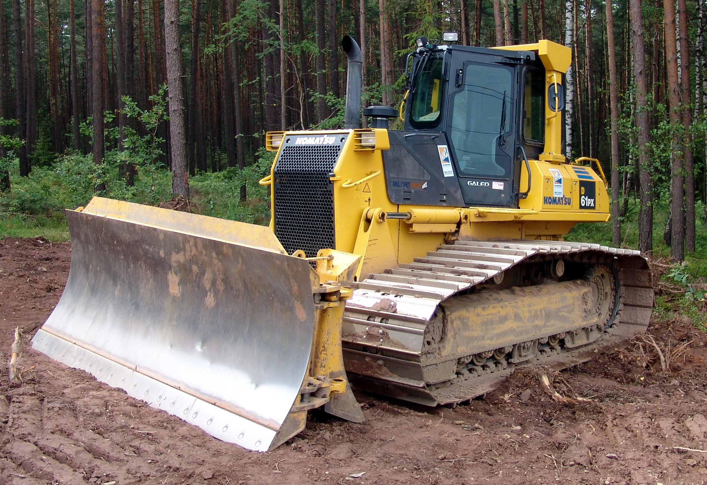 Komatsu 61PX Planierraupe